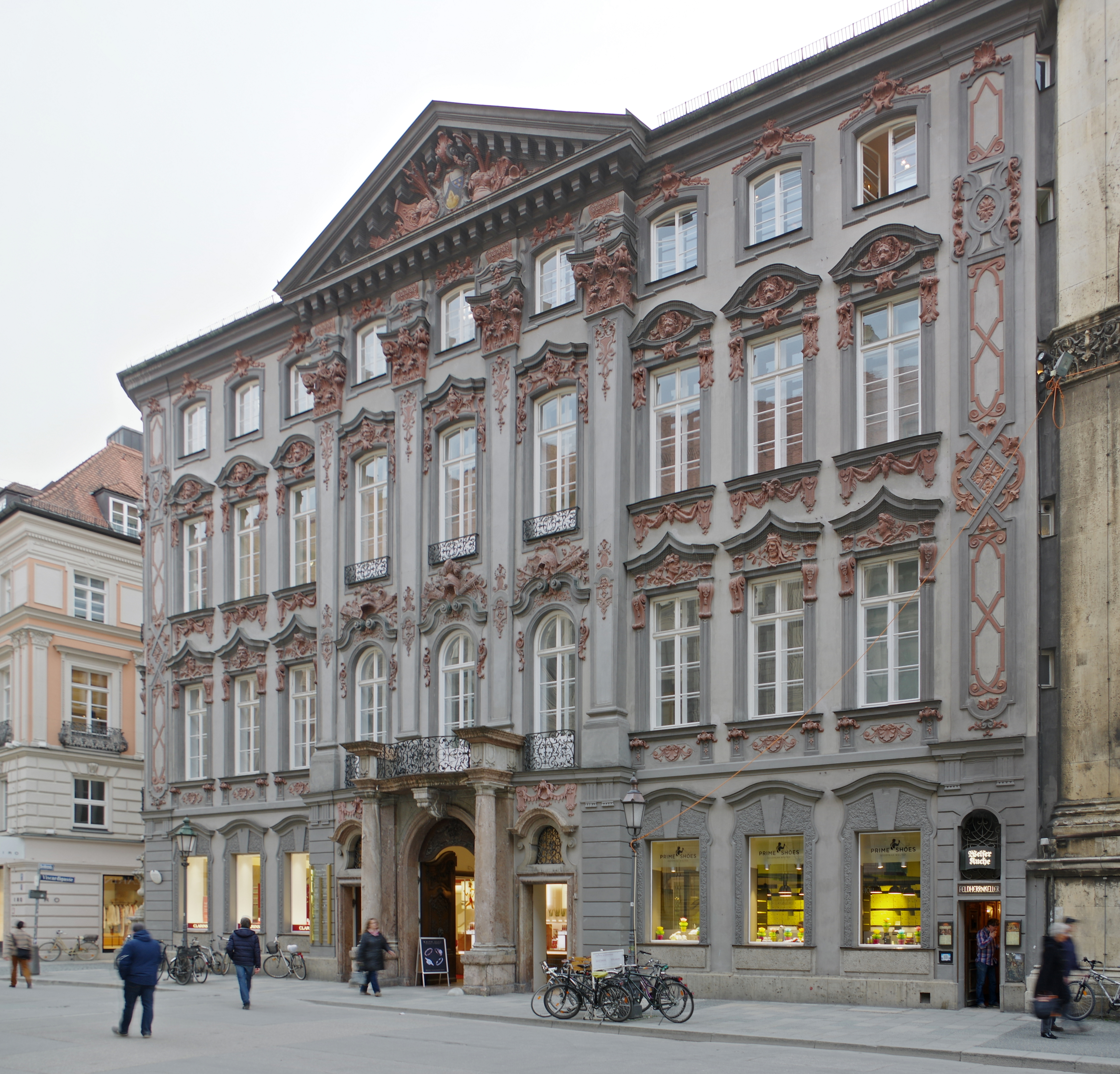 München, Residenzstraße 27, Preysing-Palais; Akten-Nr. D-1-62-000-5770